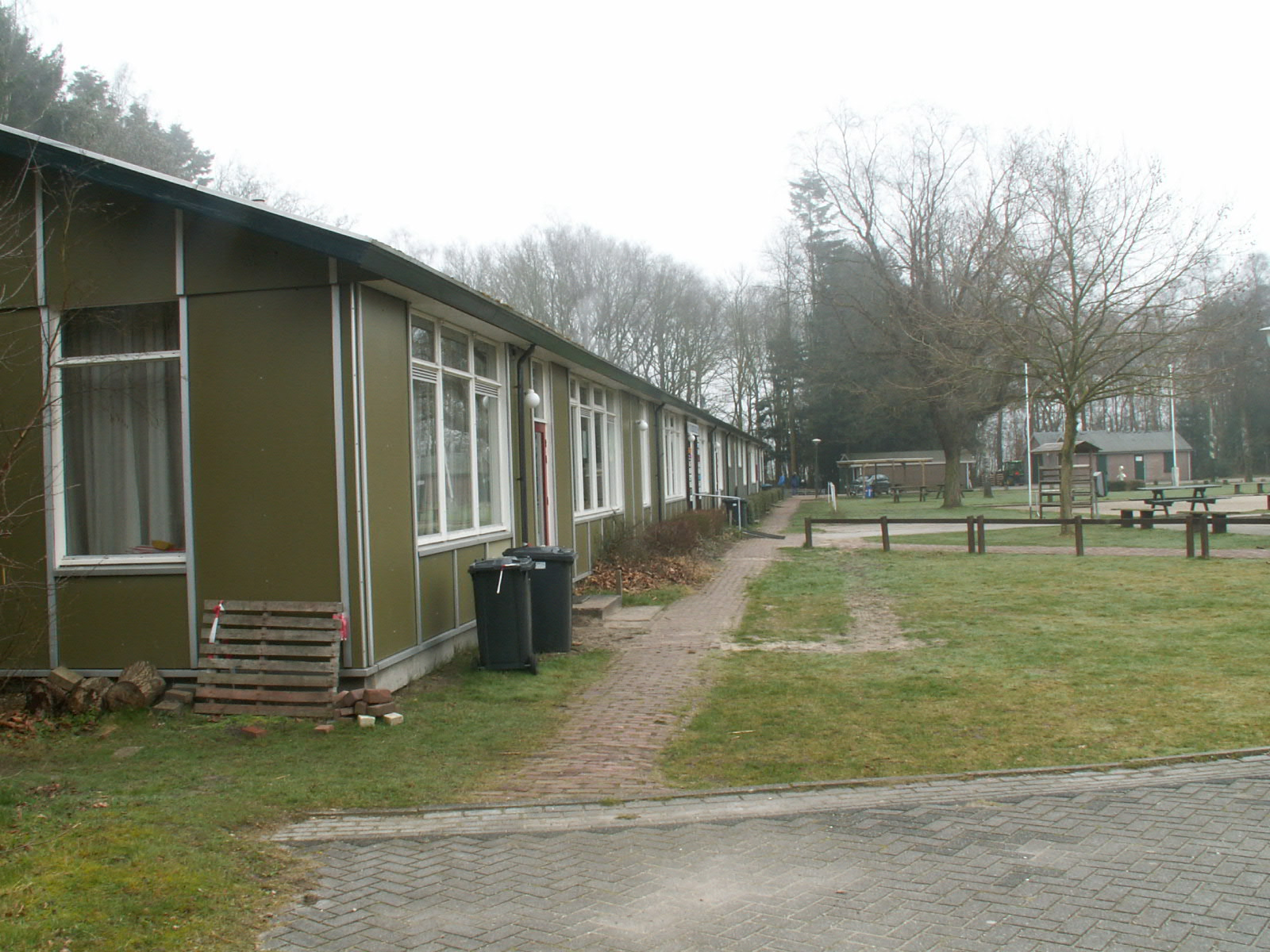 Voormalig gebouw Kamp Diever Geupload op verzoek van auteur Dirk Wiggerink